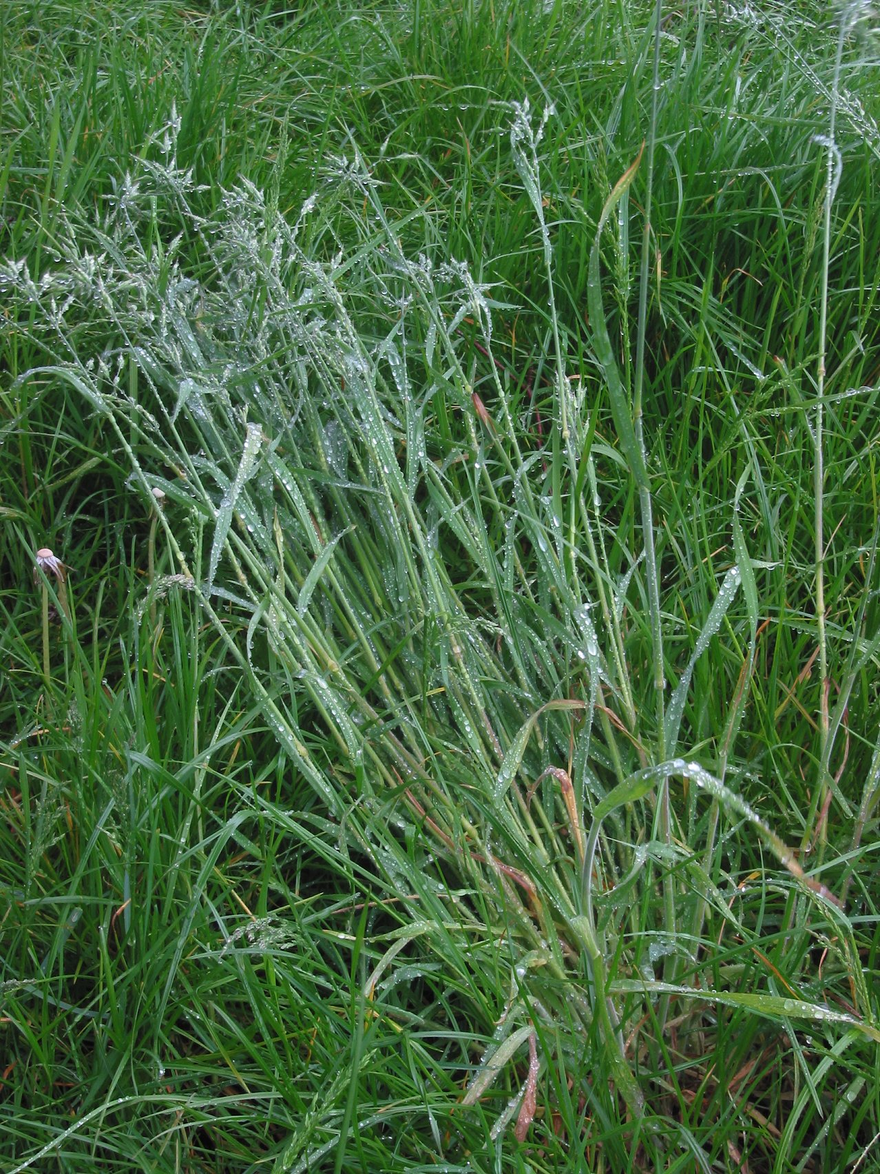 Bromus mollis (Zachte dravik bloeiende plant)